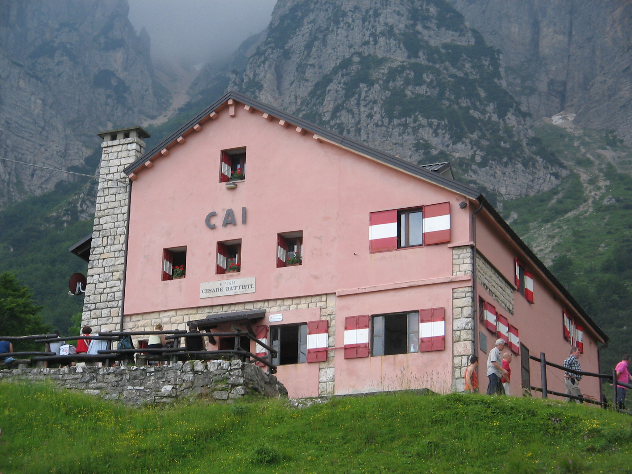 Rifugio Battisti alla Gazza